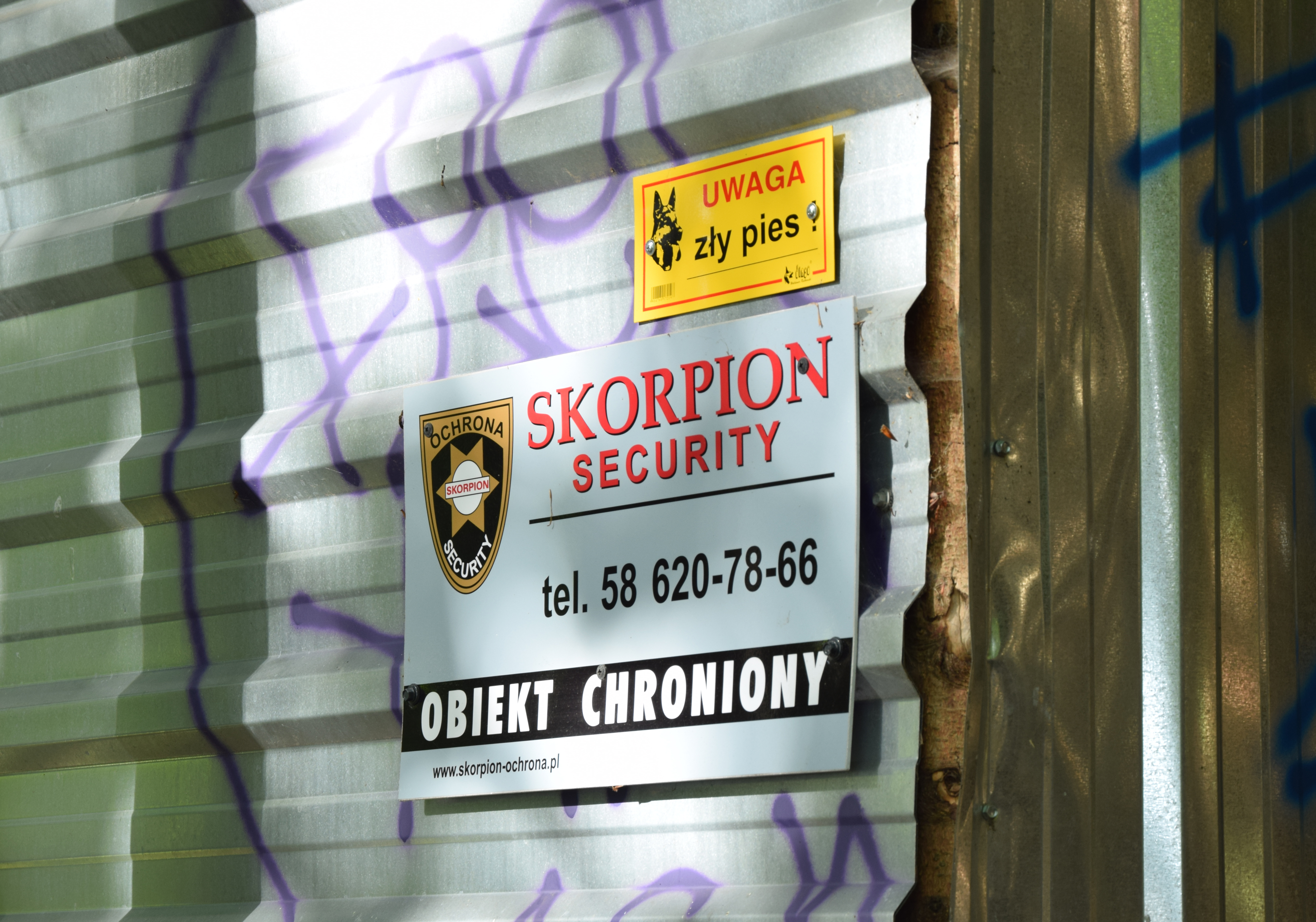 Tablica na ścianie płotu w opuszczonym sanatorium w Gdyni